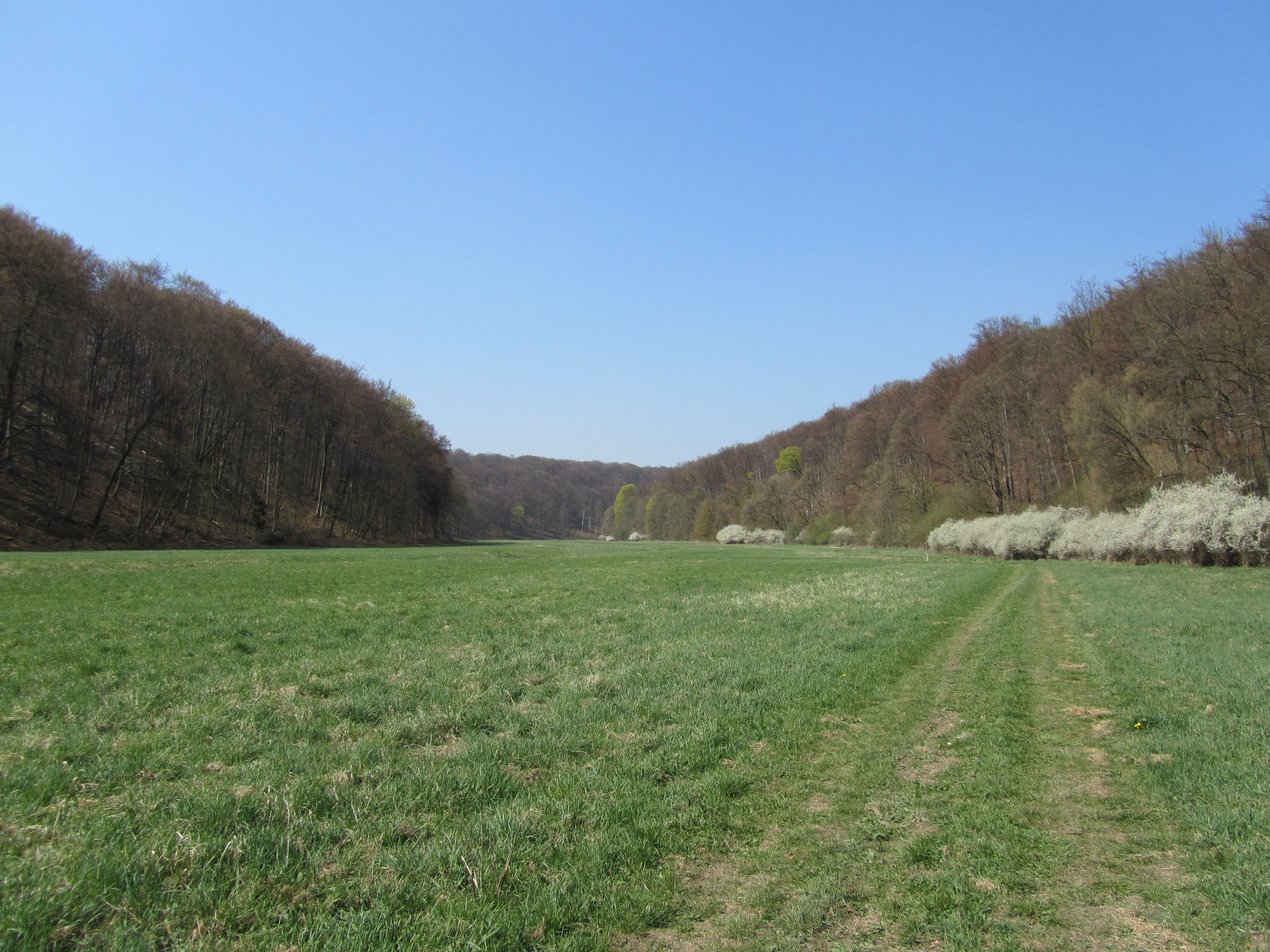 Im oberen Helbetal bei Sondershausen (Thüringen).